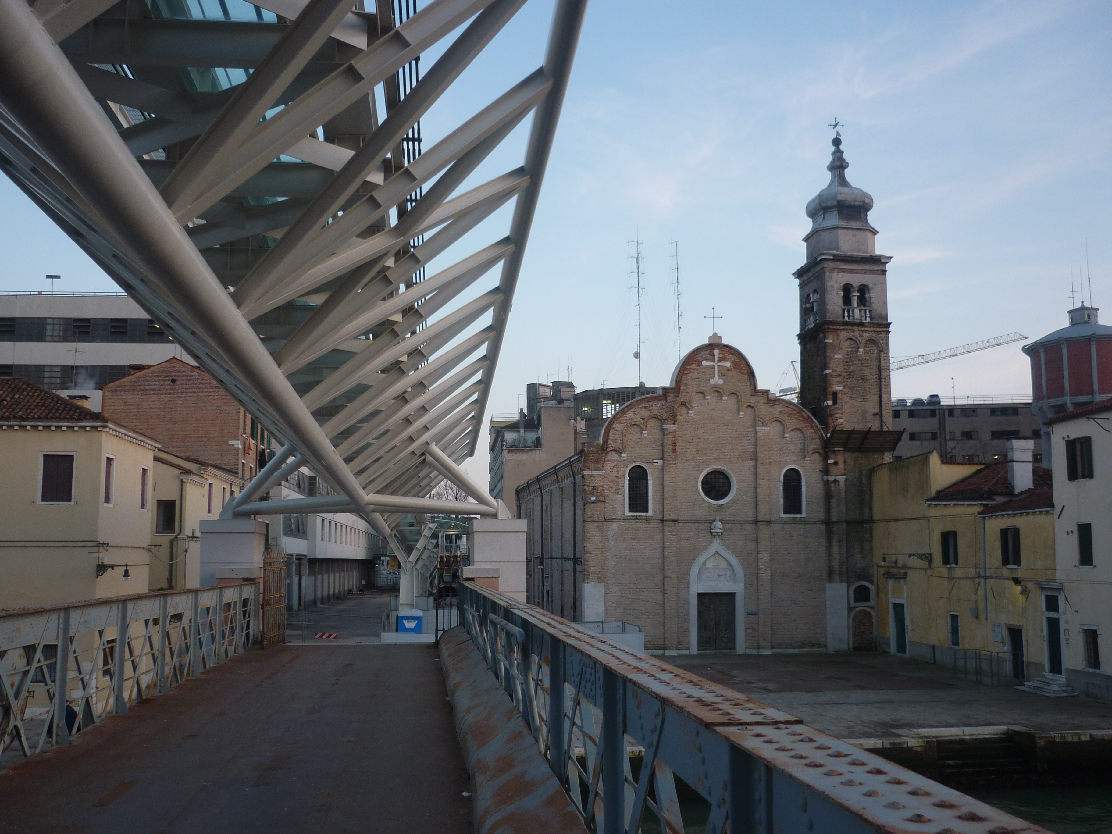 venezia